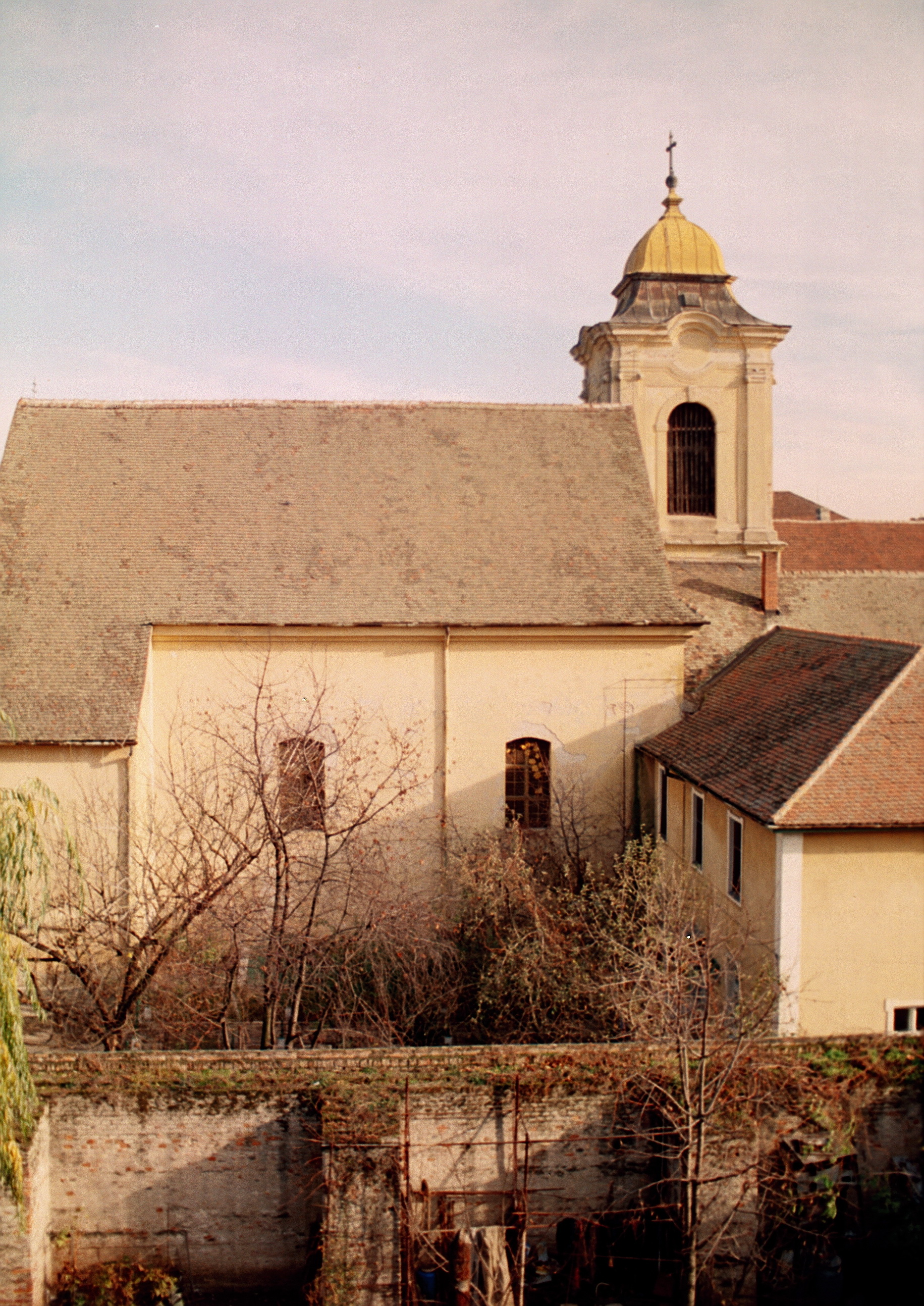 Biserica Mizericordienilor, azi biserică greco- catolică; vedere din spate 01